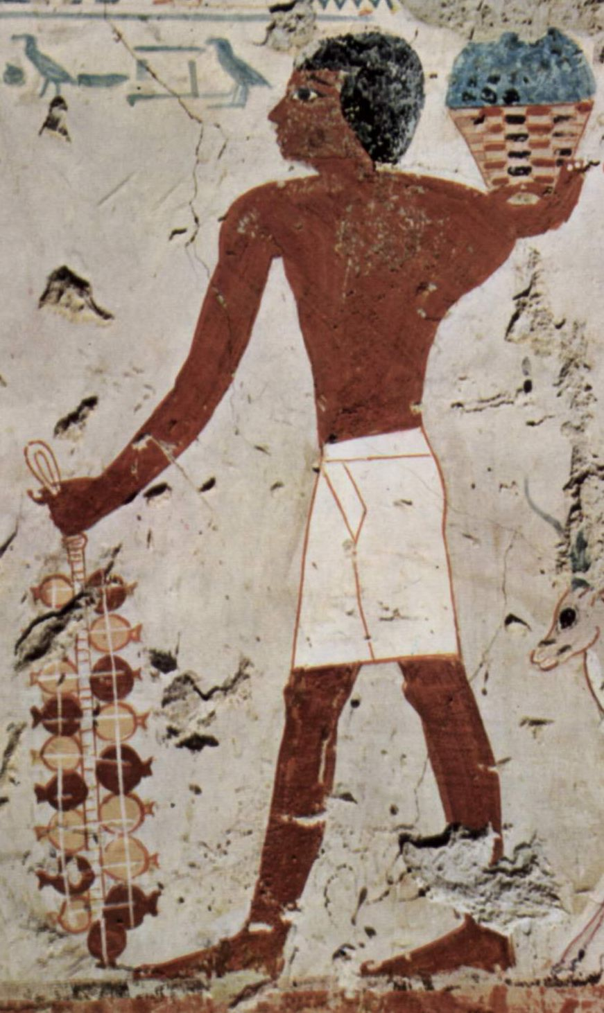 Grabkammer des Amenemhêt, ranghoher Offizier unter der Regierung des Thutmosis' III., Szene: Opferträger